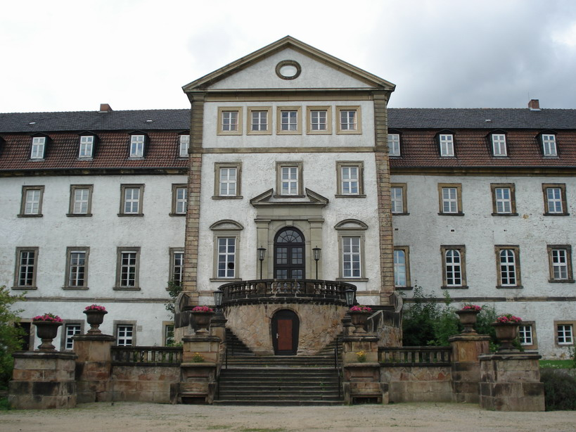 Eingang des Ringelheimer Schlosses